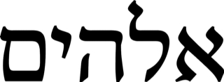 Nome "Elohim" scritto in caratteri ebraici originali. Lettere dell'alfabeto ebraico di uso comune, liberamente disponibili e diffusi senza necessità di licenza alcuna.